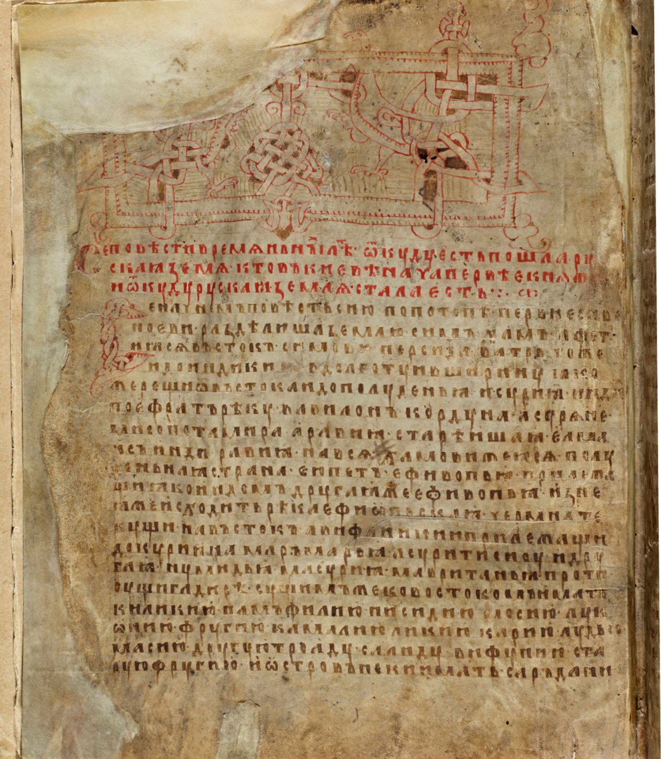 Шифр: F.п.IV.2. Ф. 550 - Основное собрание рукописной книги, инв. 219. - Лаврентьевская летопись 1377 г. - Л. 1 об.